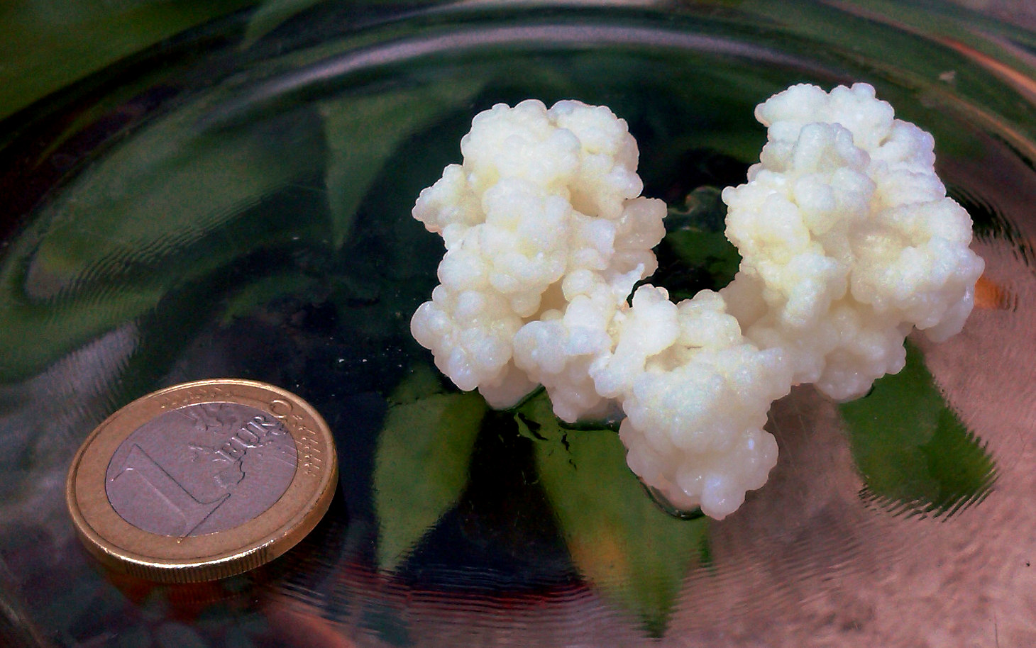 Unos gramos de kéfir de leche junto a una moneda de 1€ (para escala).